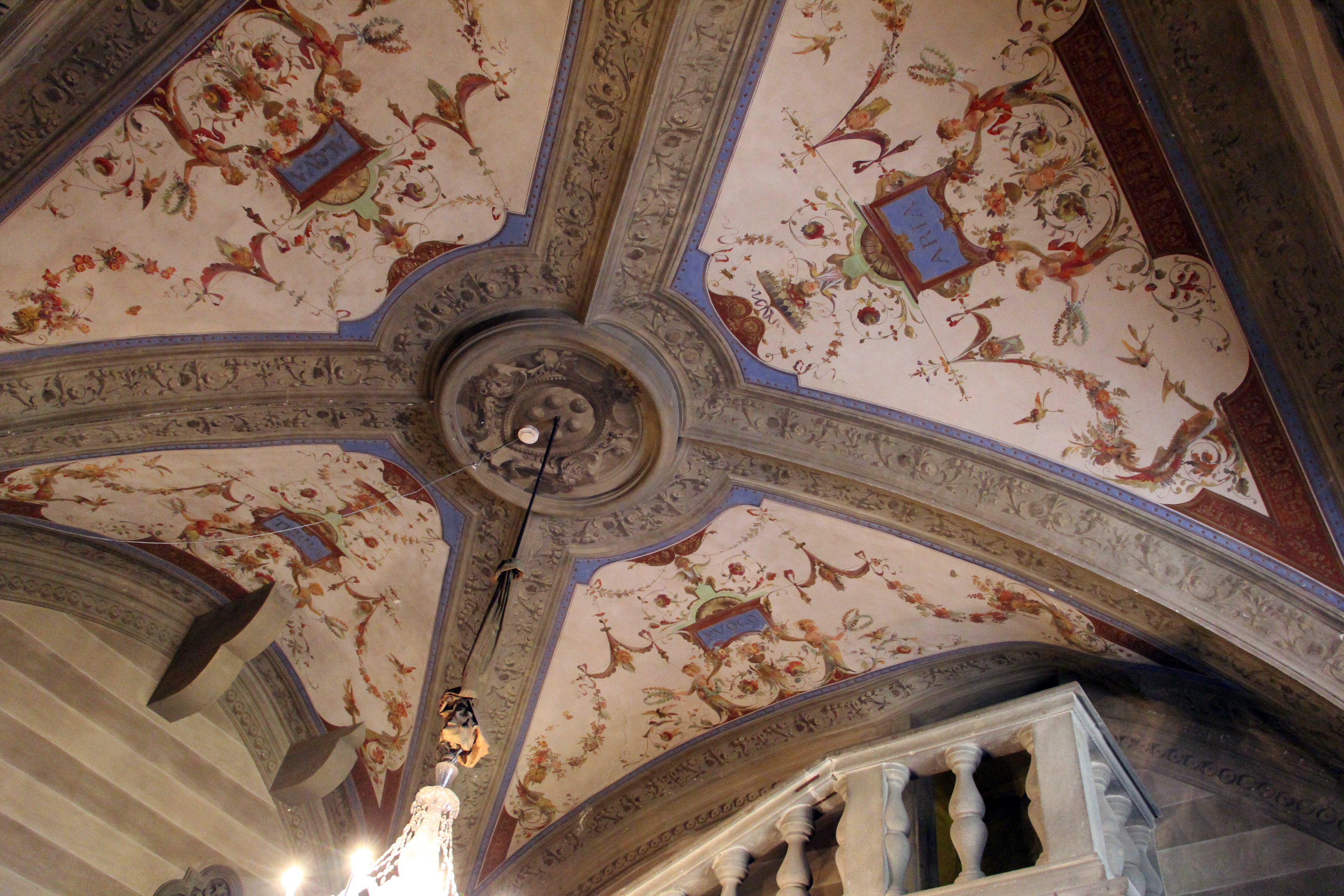 Villa medicea di Poggio a Caiano - MIBAC The making of this document was supported by Wikimedia CH. (Submit your project!) For all the files concerned, please see the category Supported by Wikimedia CH. This is a photo of a monument which is part of cultural heritage of Italy.